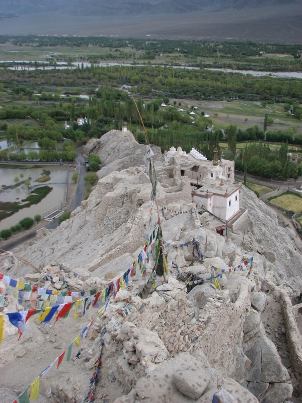 Shey Palace, Ladakh, India